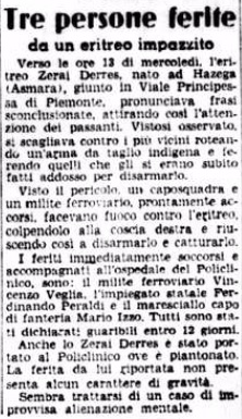 Articolo pubblicato nella cronaca cittadina di Roma dal quotidiano Il Messaggero del 17 giugno 1938 in merito all'episodio di Zerai Deres “Tre persone ferite da un eritreo impazzito Verso le ore 13 di mercoledì, l'eritreo Zerai Derres, nato ad Hazega (Asmara), giunto in Viale Principessa di Piemonte, pronunciava frasi sconclusionate, attirando così l'attenzione dei passanti. Vistosi osservato, si scagliava contro i più vicini roteando un'arma da taglio indigena e ferendo quelli che gli si erano subito fatti addosso per disarmarlo. Visto il pericolo, un caposquadra e un milite ferroviario, prontamenti accorsi, facevano fuoco contro l'eritreo, colpendolo alla coscia destra e riuscendo così a disarmarlo e catturarlo. I feriti, immediatamente soccorsi e accompagnati all'ospedale del Policlinico, sono: il milite ferroviario Vincenzo Veglia, l'impiegato statale Ferdinando Peraldi e il maresciallo capo di fanteria Mario Izzo. Tutti sono stati dichiarati guaribili entro 12 giorni. Anche lo Zerai Derres è stato portato al Policlinico ove è piantonato. La ferita da lui riportata non presenta alcun carattere di gravità. Sembra trattarsi di un caso di improvvisa alienazione mentale.”